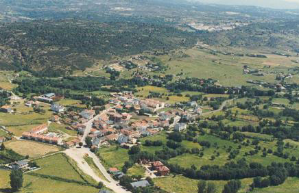 Vista aérea de Navalafuente.